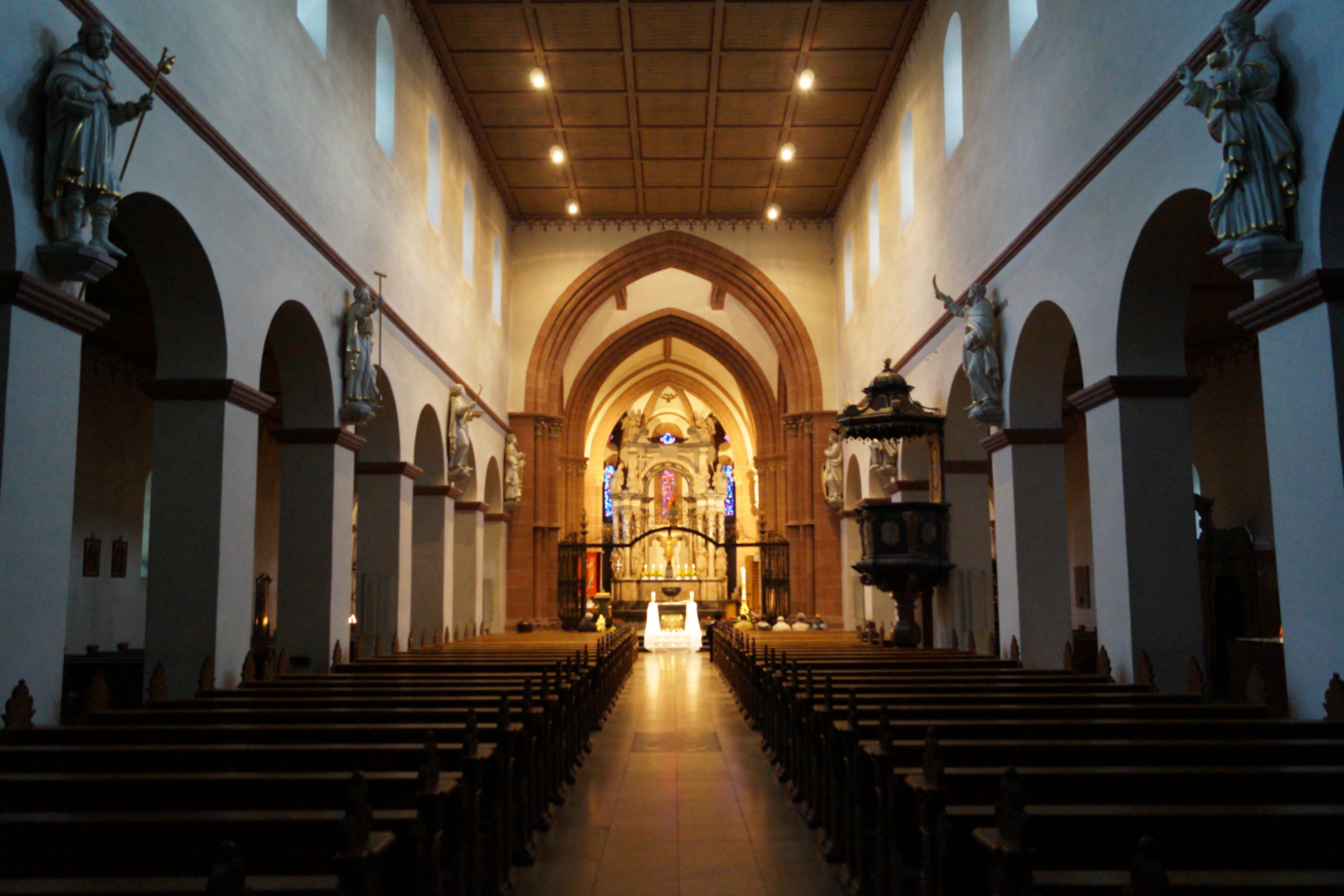 Basilika St. Marcellinus und Petrus in Seligenstadt, Ansicht des Innenraumes.